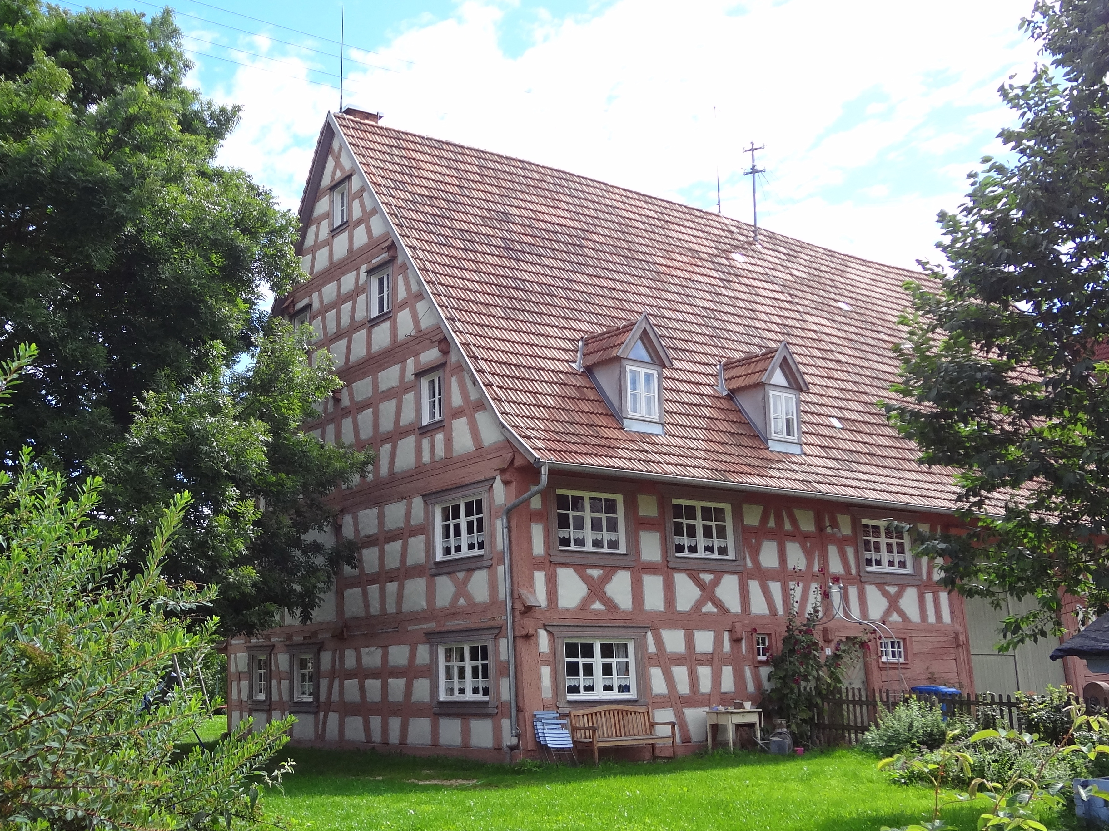 Jockenhansen Haus, Im Winkel 7, Zimmern-Flözlingen